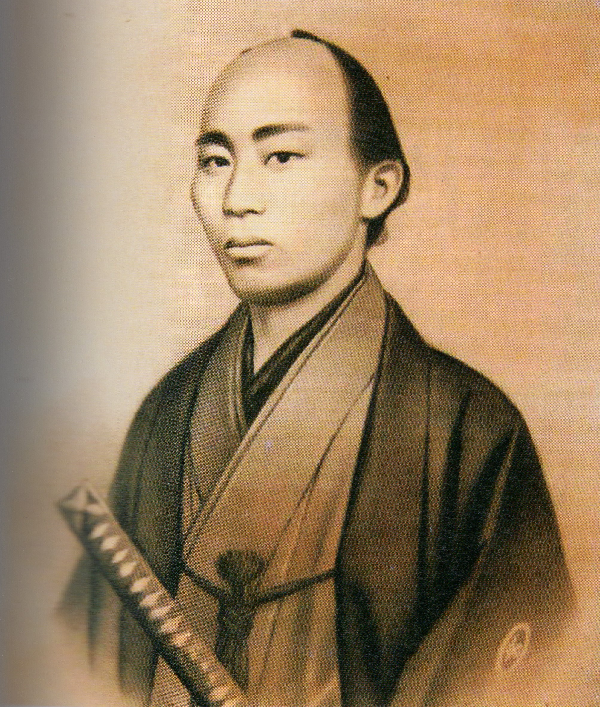 古屋佐久左衛門の肖像写真。